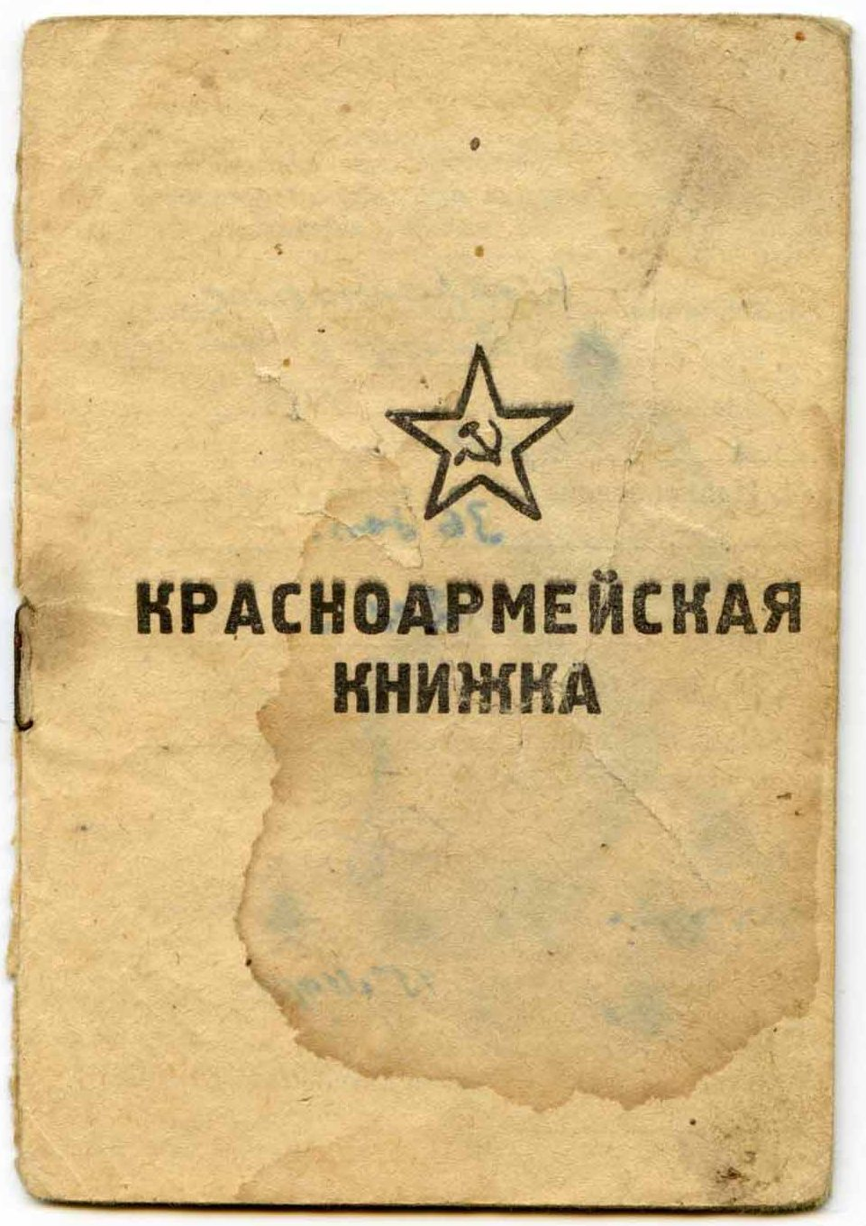 Красноармейская книжка Народного Комиссариата Обороны СССР рядового состава. Весна 1945 года (выдана 15 марта 1945). Обложка из обычной плотной бумаги.